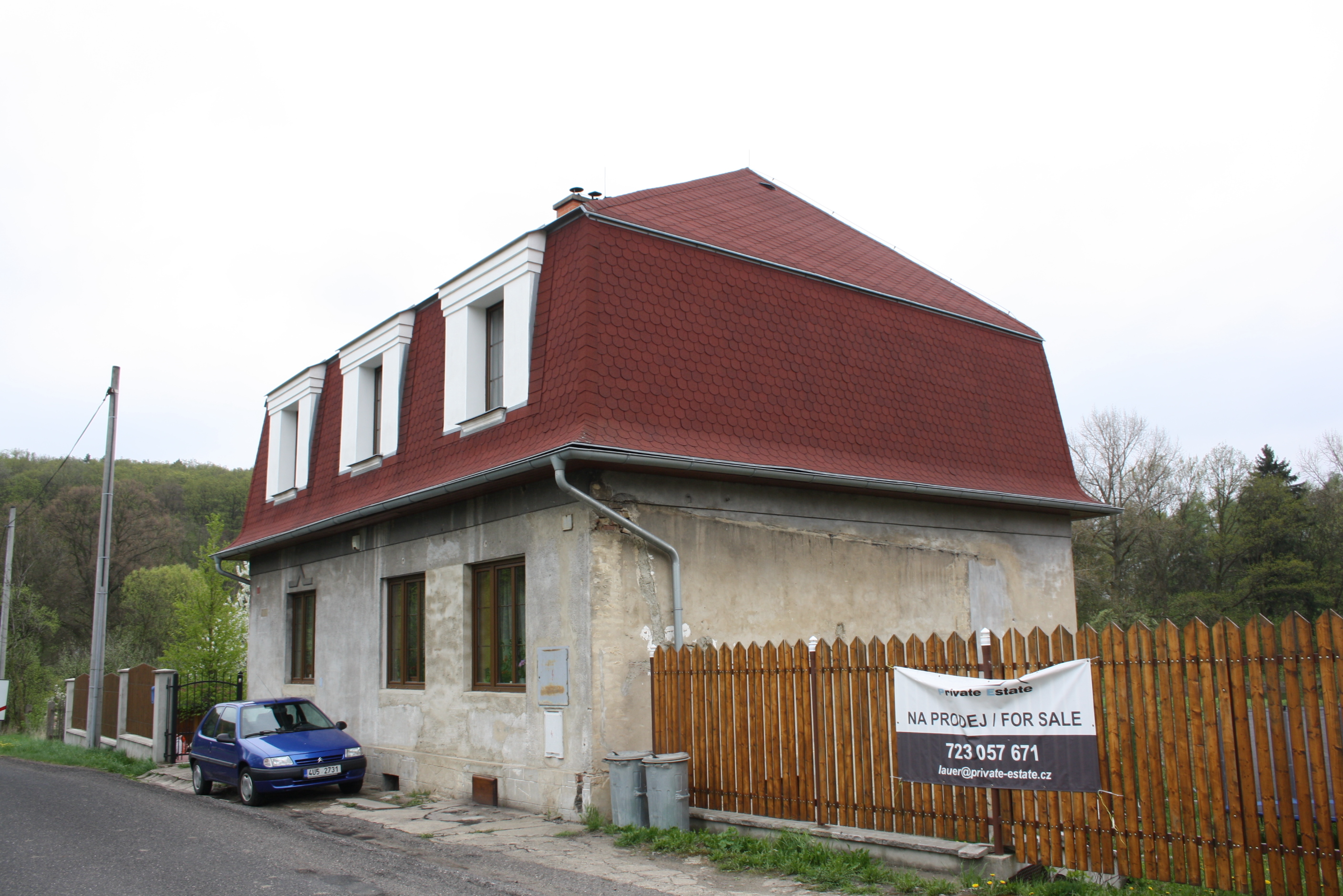 Dům číslo popisné 15 v Horních Řepčicích.